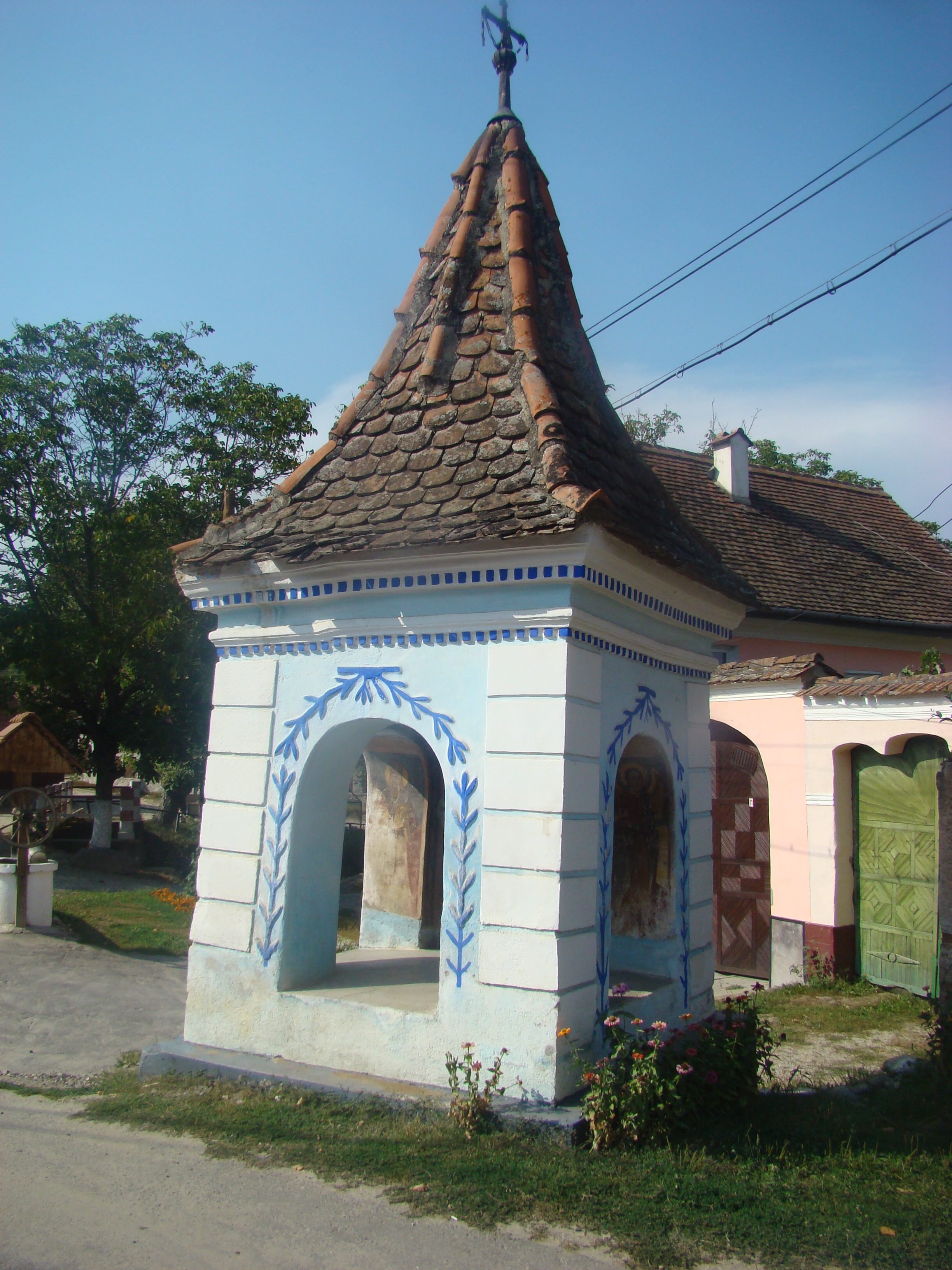 Troiță